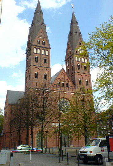 Die heutige Domkirche St. Marien in der Danziger Straße in St. Georg wurde von 1890 bis 1893 nach Plänen von Arnold Güldenpfennig im neoromanischen Stil erbaut. Sie war damals das erste nach der Reformation als römisch-katholische Kirche neu erbaute Gotteshaus in Hamburg. This is a photograph of an architectural monument.